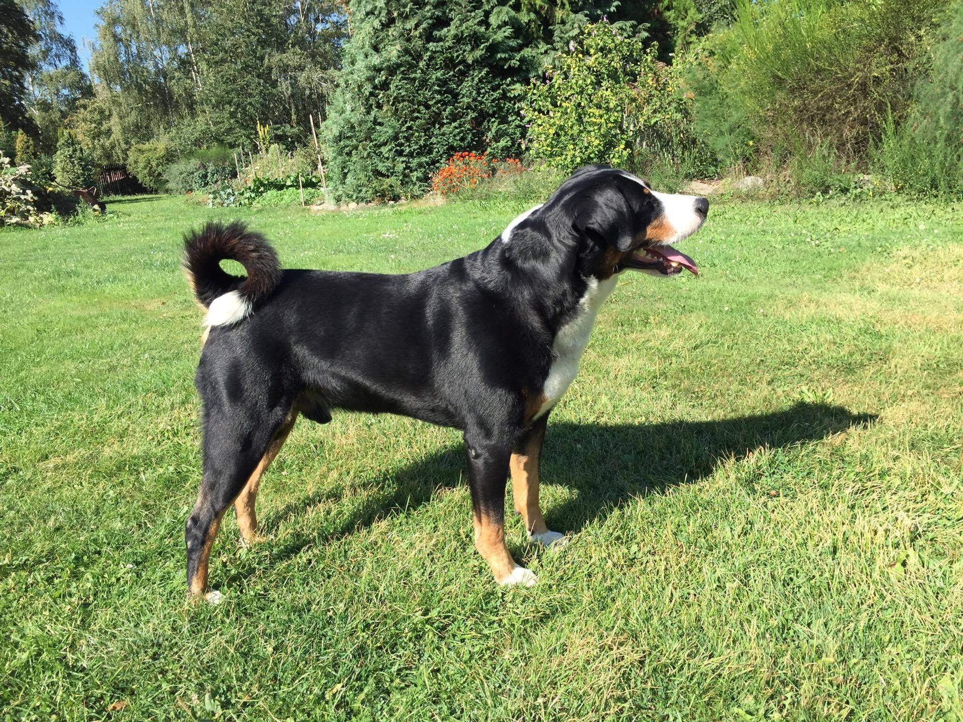 Appenzellský salašnický pes